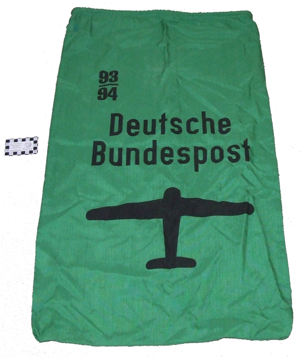 Postbeutel der Deutschen Bundespost, hier ein grüner Luftpostbeutel